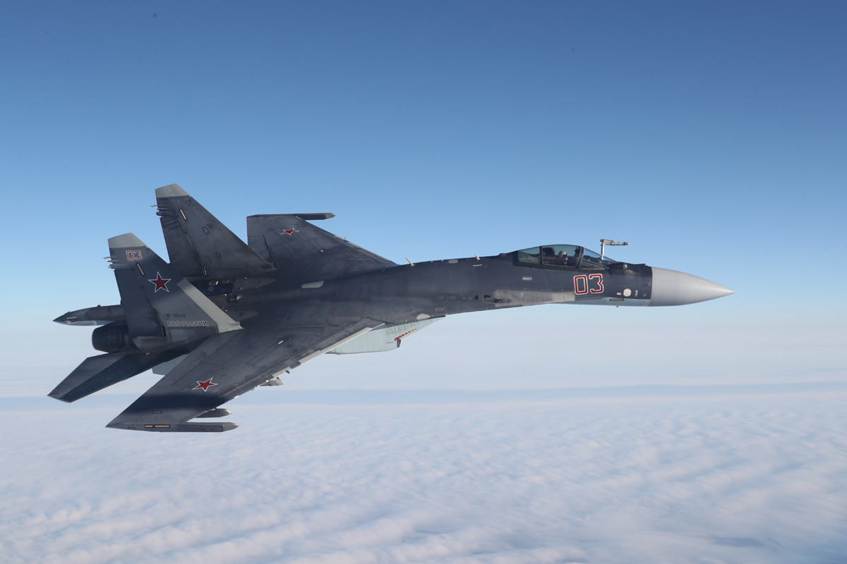 Отработка дозаправки Су-35С воздухе летчиками Липецкого авиацентра.